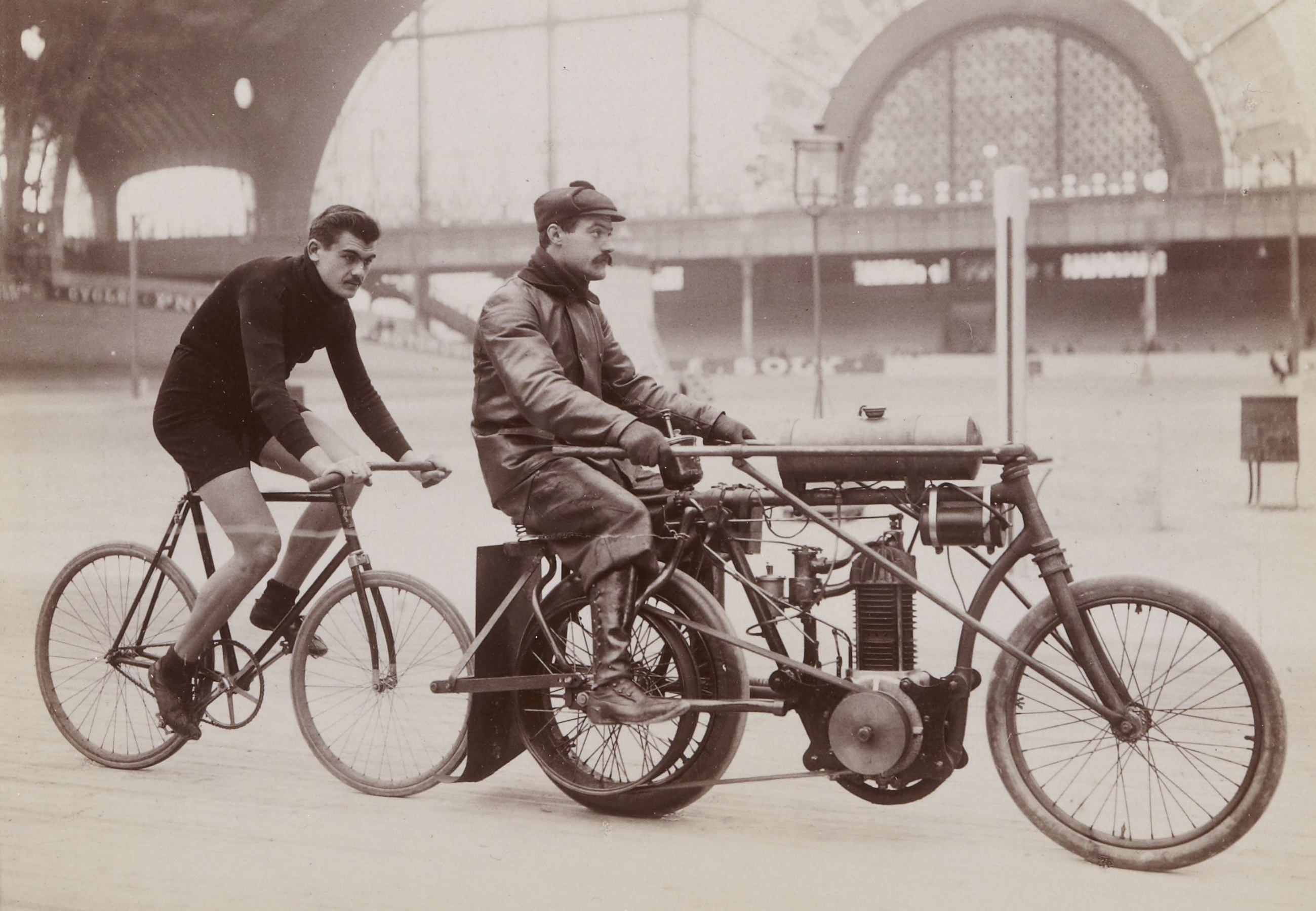 [Collection Jules Beau. Photographie sportive] : T. 24. Années 1903 et 1904 / Jules Beau : F. 43v. Vélodrome d hiver ; Dangla, Marius Thé